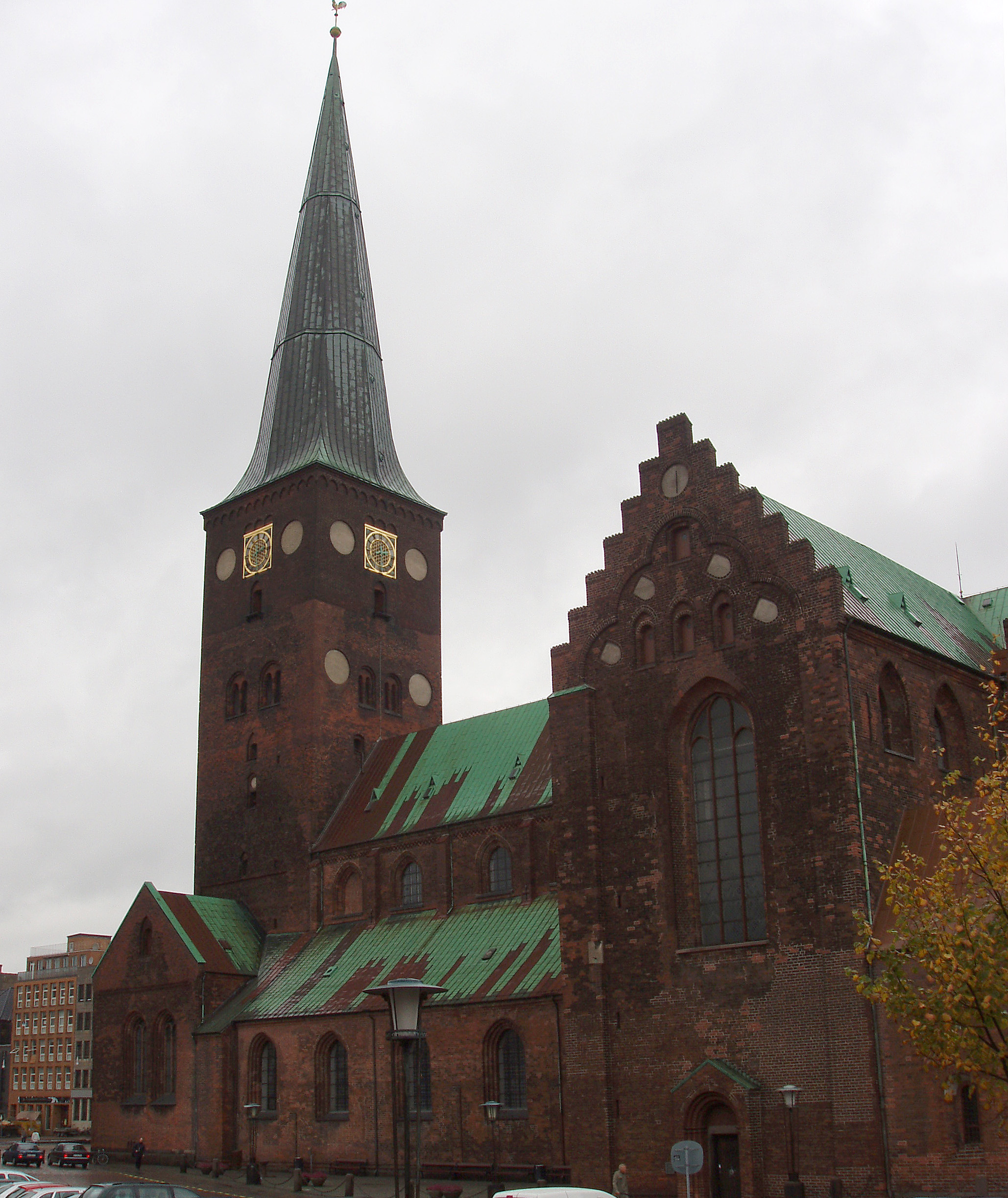 Århus Domkirke set fra sydøst